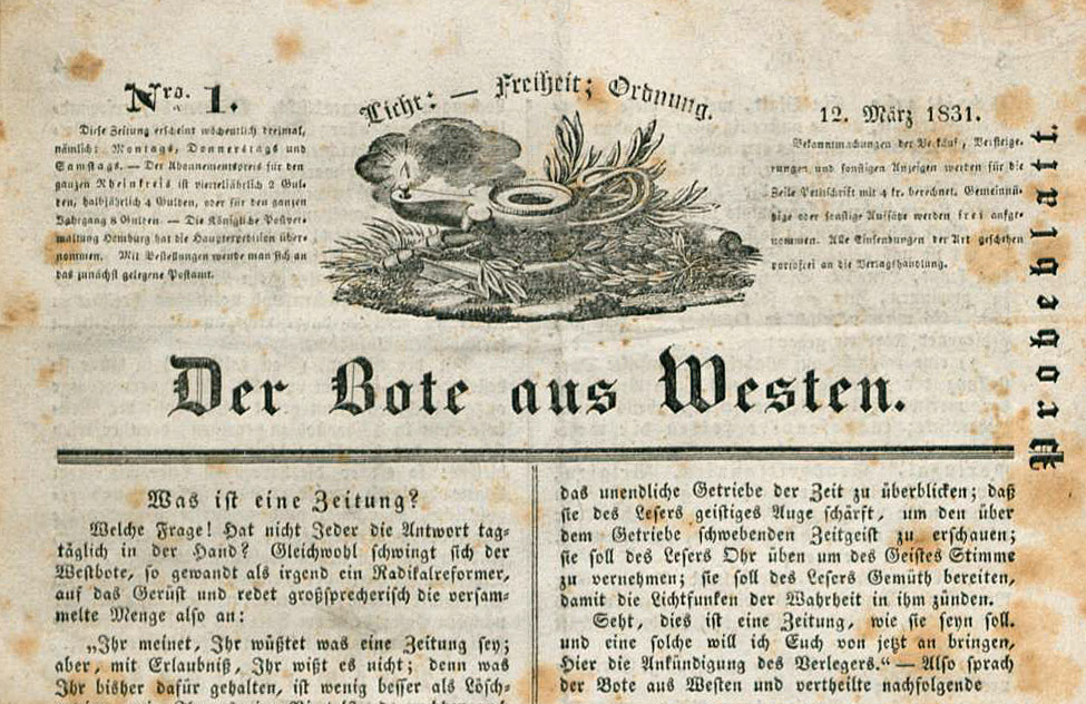 Titelblatt der Zeitung "Der Bote aus Westen" vom 12. März 1831, Druck und Verlag von Georg Ritter